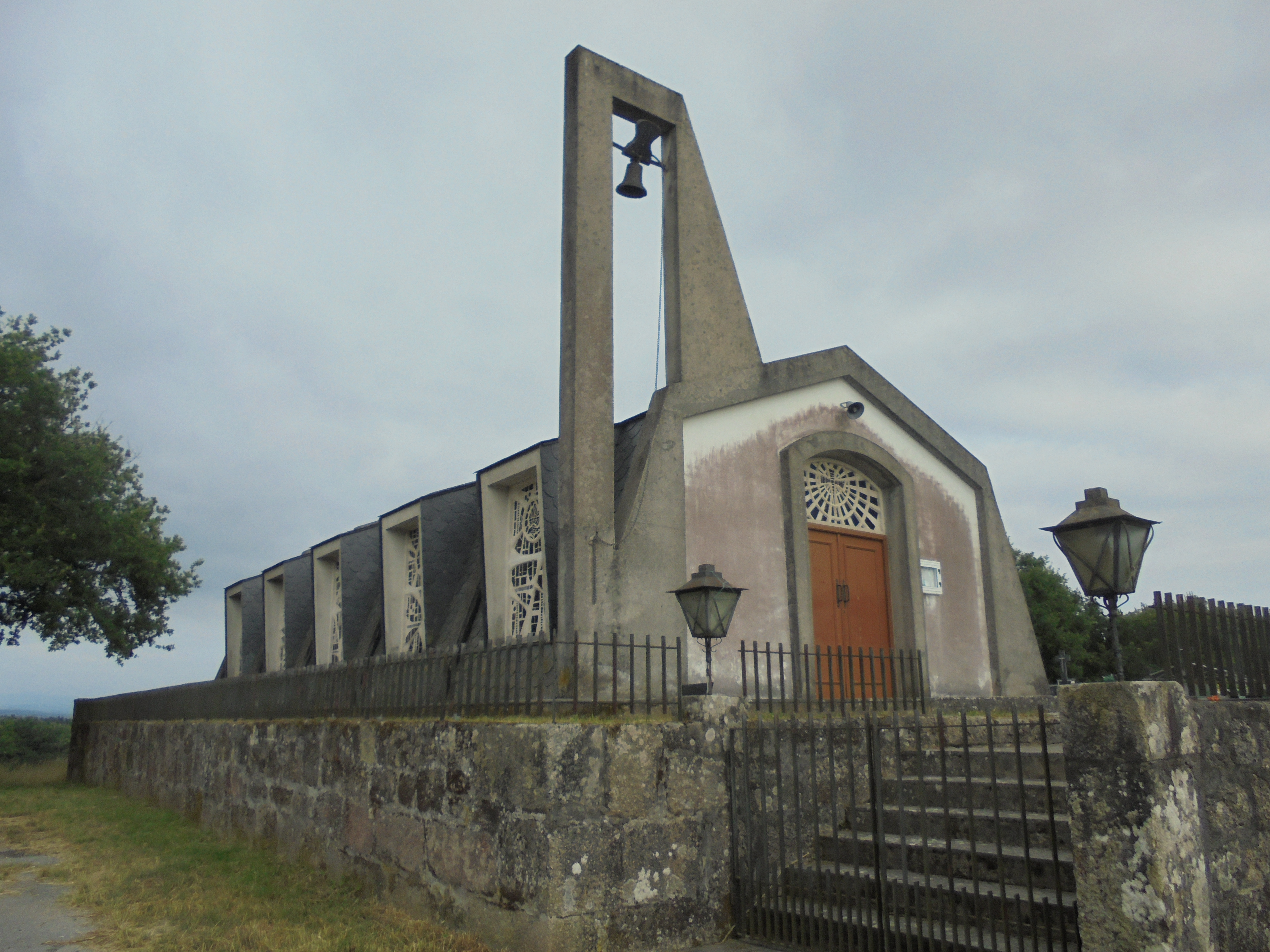 Igrexa de San Estevo de Farnadeiros ( O Corgo)